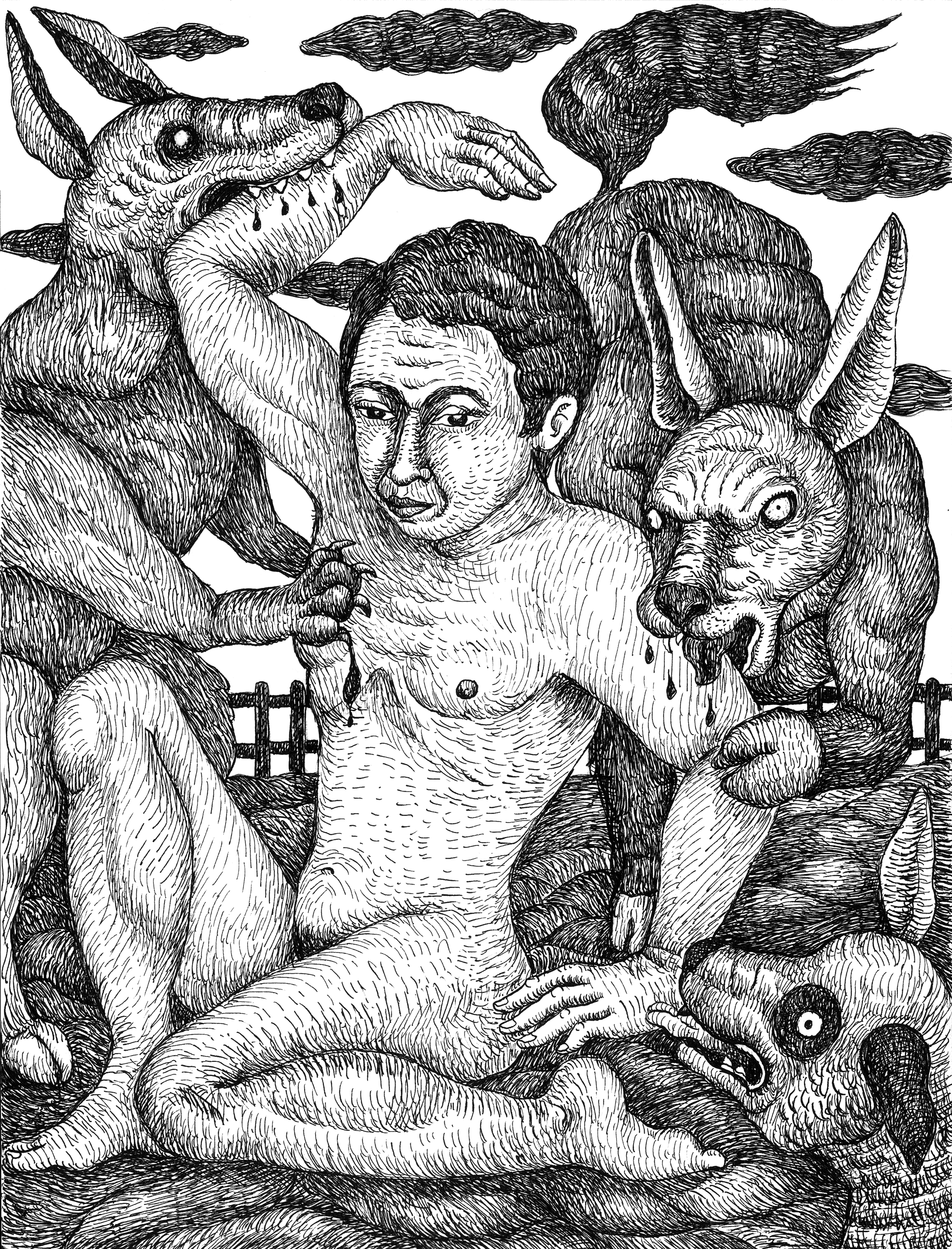 dessin